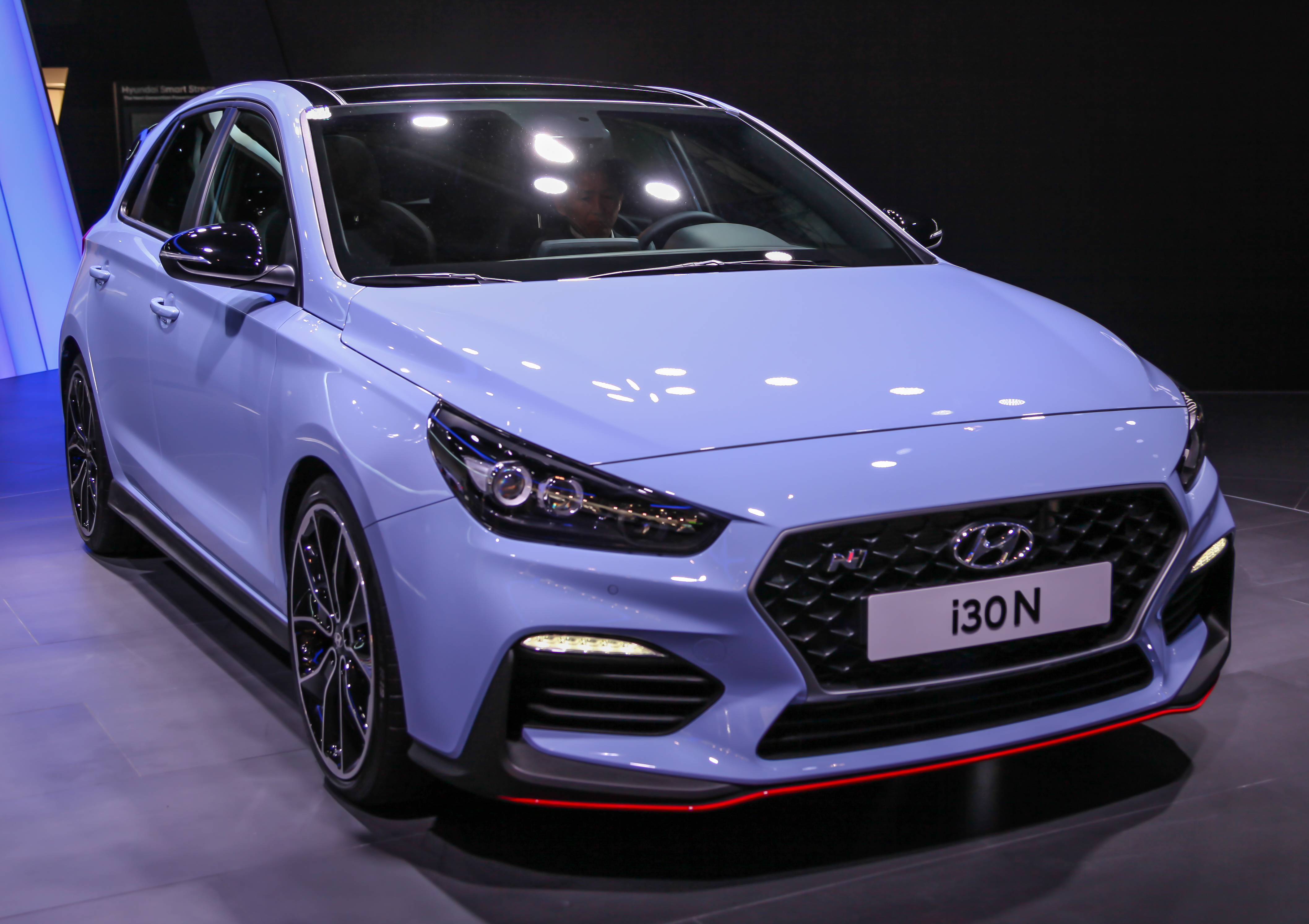 Hyundai i30 N